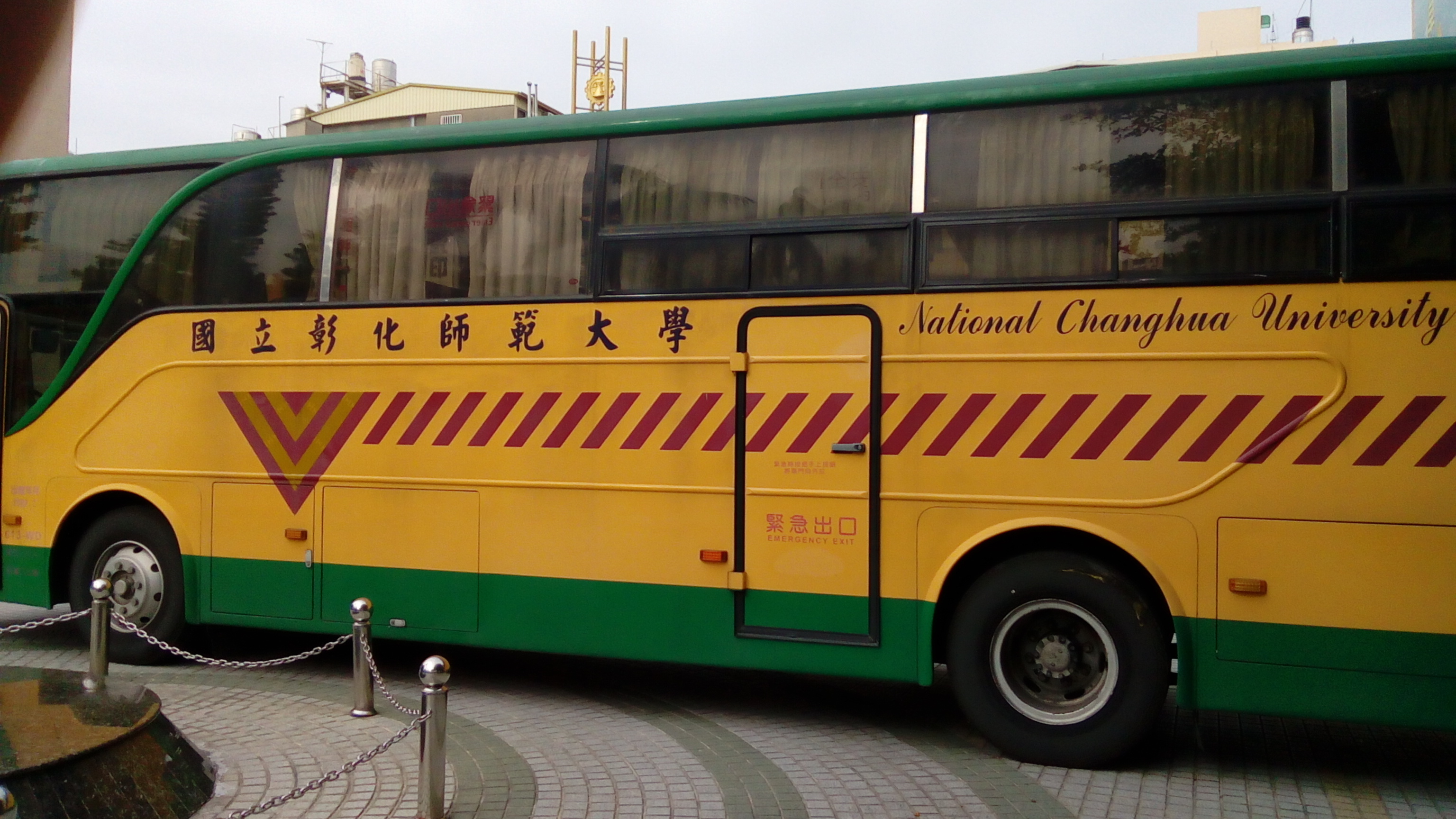 國立彰化師範大學2007年日野RK8JRSK校區接駁車613-WD。